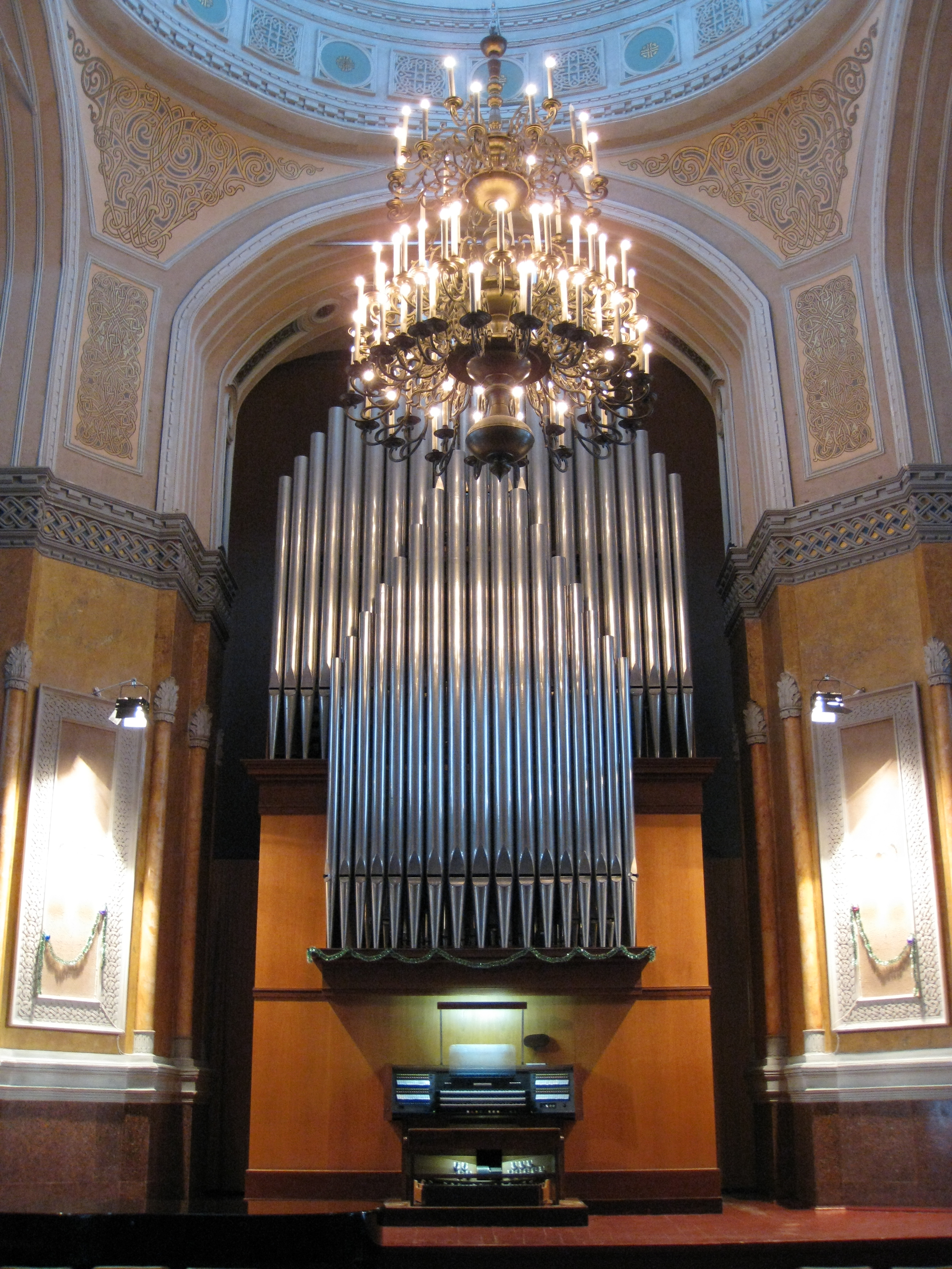 Kharkov Organ